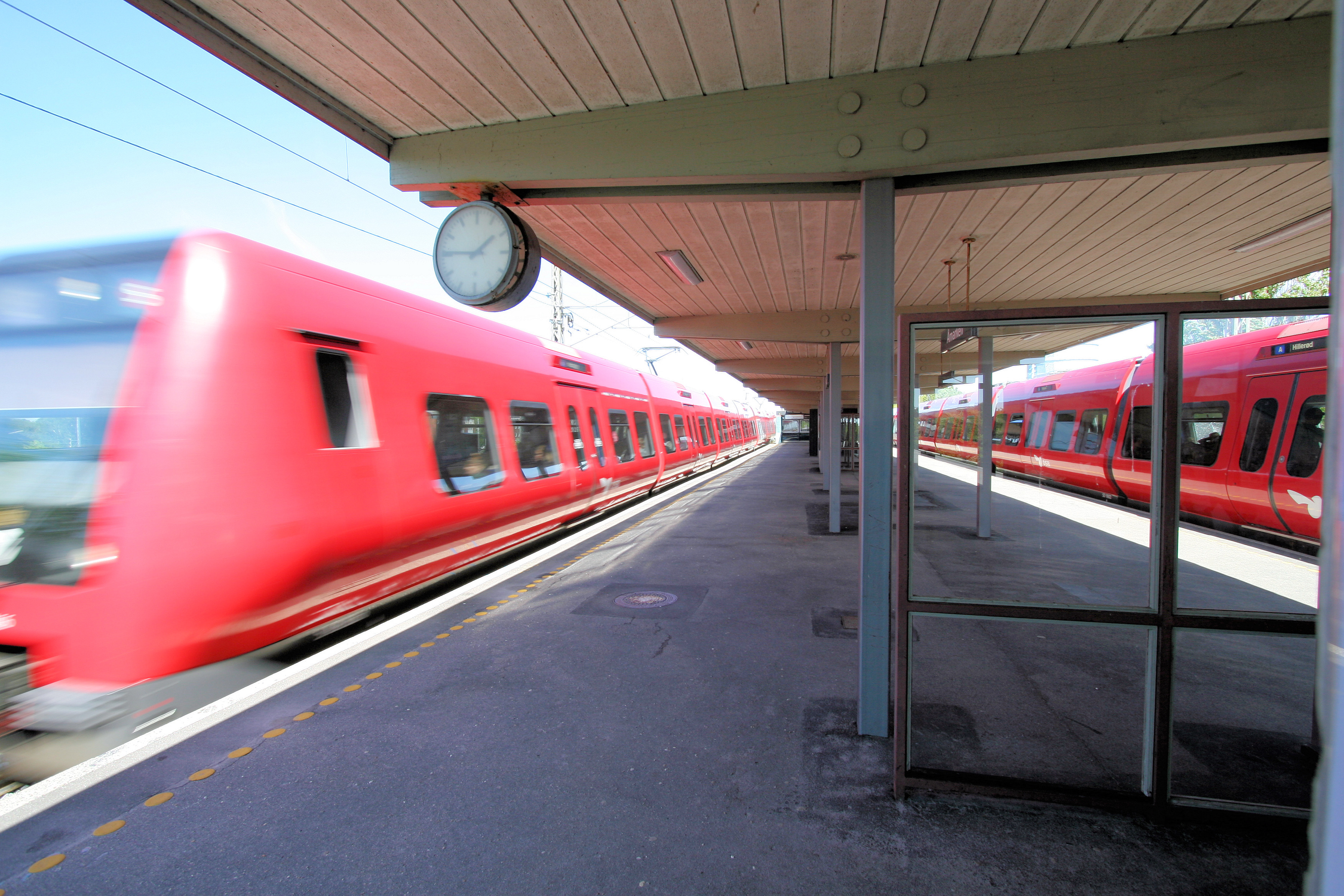 Åmarken Station, Denmark. S-train station in suburban Copenhagen. Ikke alle tog standser på Åmarken